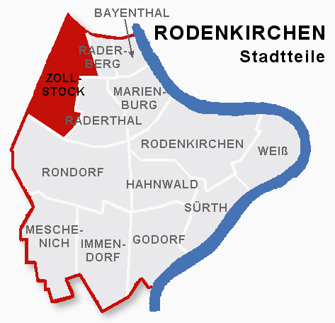 Lage des Stadtteils Zollstock im Stadtbezik Rodenkirchen